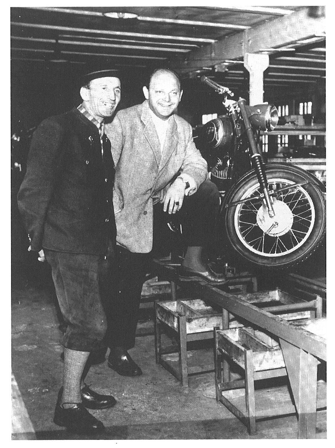 KTM-Gründer Hans Trunkenpolz und Ernst Kronreif in den 1950er Jahren